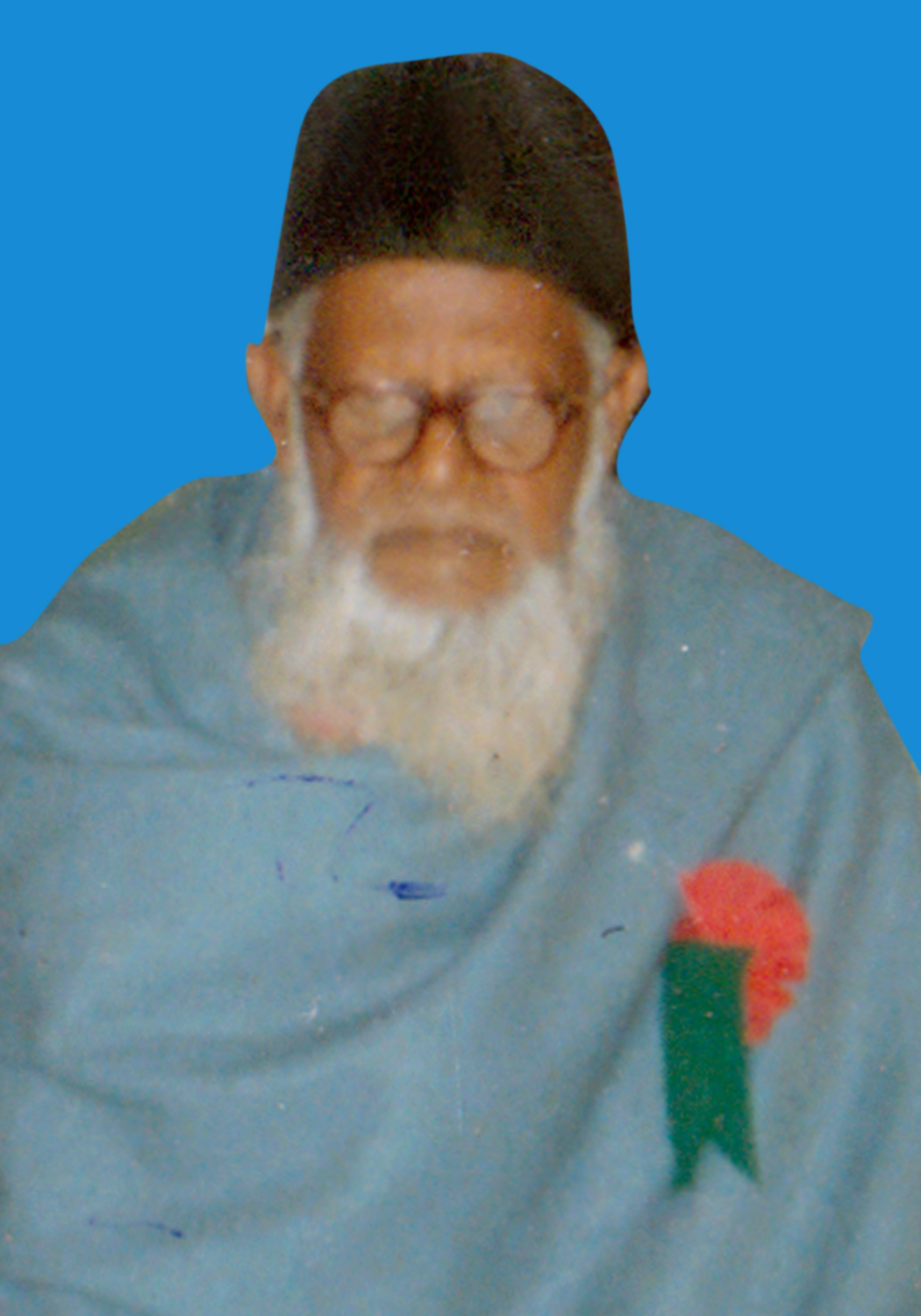 عبد الرحإن خاں وصفی بہرائچی کی ایک نایاب تصویر